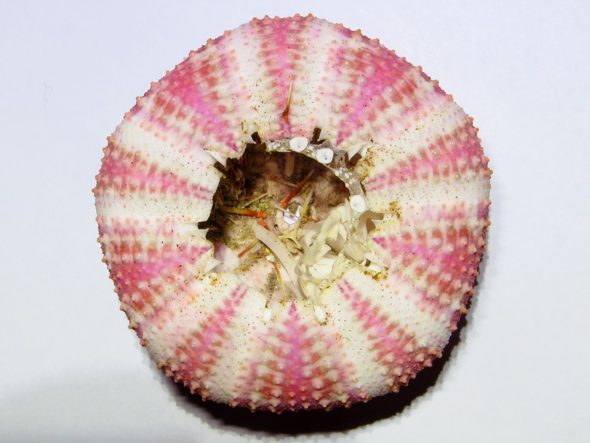 Un test (squelette) d'oursin-fleur Toxopneustes pileolus, trouvé à Mayotte.